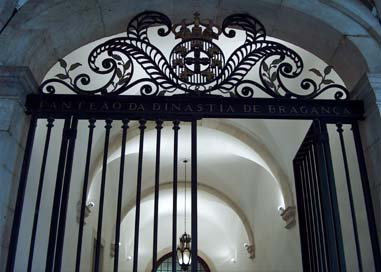 Imagem de L. GonÃ§alves, PortÃµes do PanteÃ£o Real dos BraganÃ§as